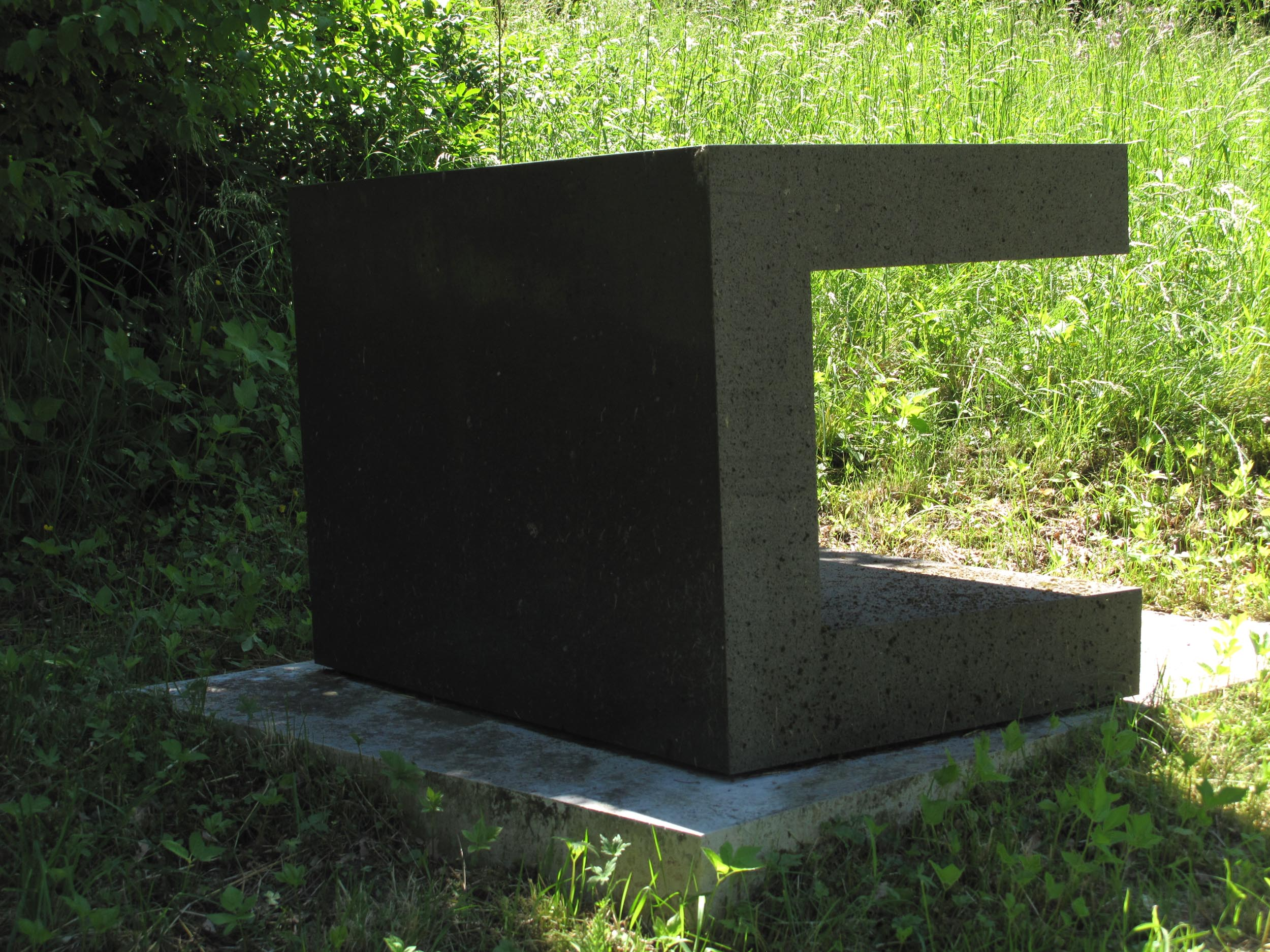 Jochen Kitzbihler, Mu, 1999, - Deutschland, Baden-Württemberg, Skulpturenpark Heidelberg